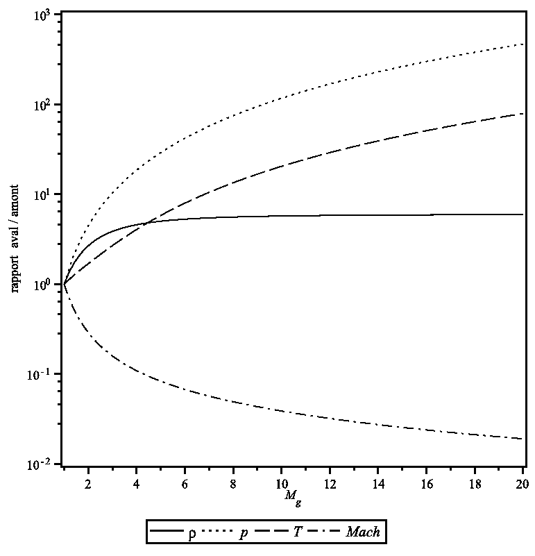 Sauts Rankine-Hugoniot